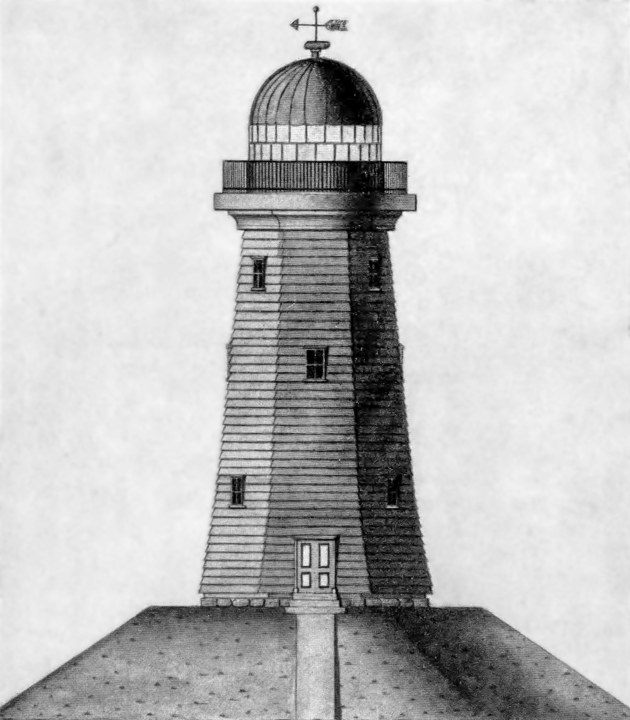 "Ansicht des auf Neuwerk von Hamburg errichteten zweiten Feuers mit Argandschen - von dem Hamburger Konstrukteur J. G. Repsold gelieferten - Parabol-Lampen. Kolorierte Zeichnung. 1815."